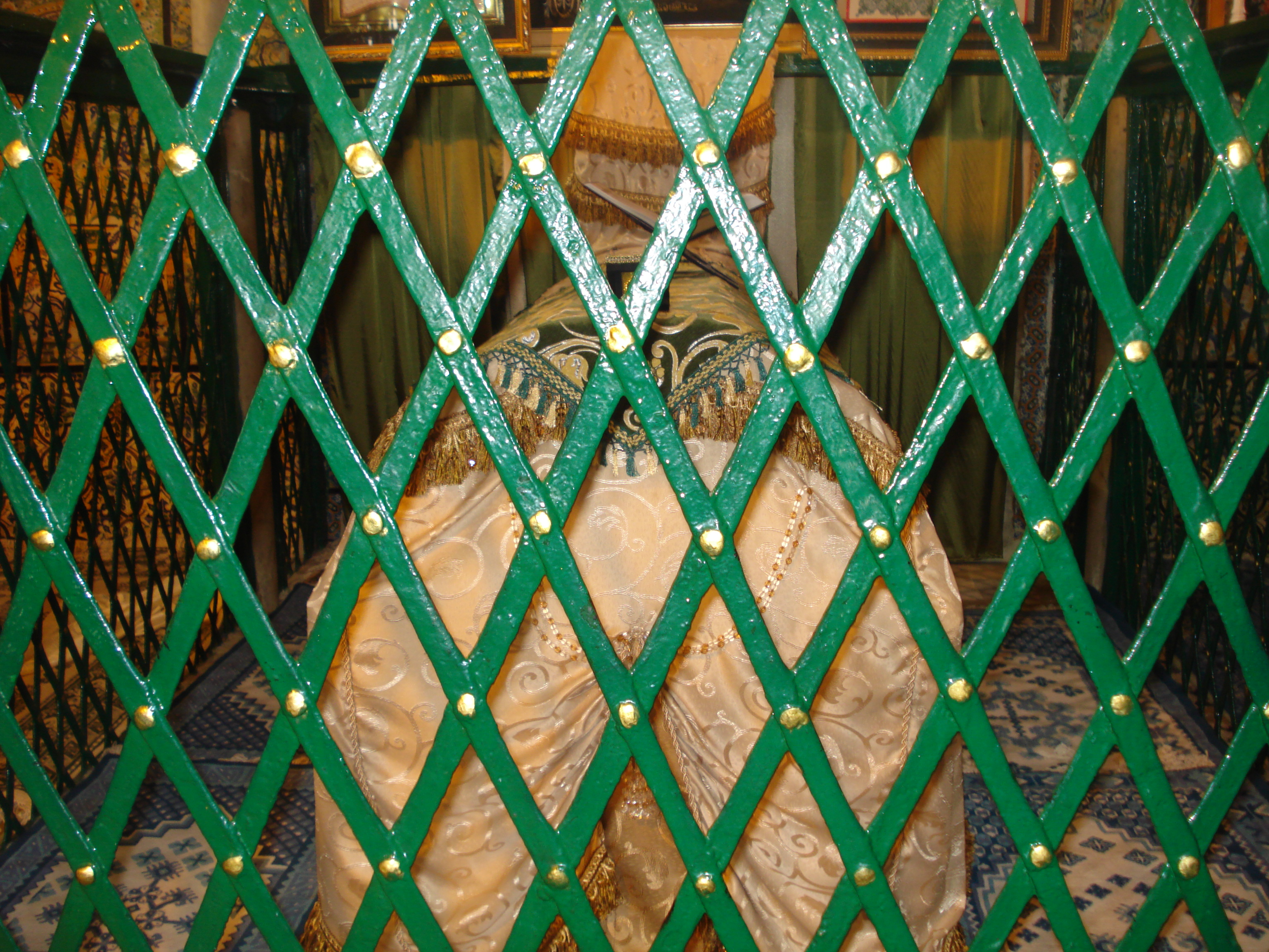 Tombeau de Sidi Sahab, compagnon du prophète Mahomet, dans la mosquée du Barbier à Kairouan (Tunisie)